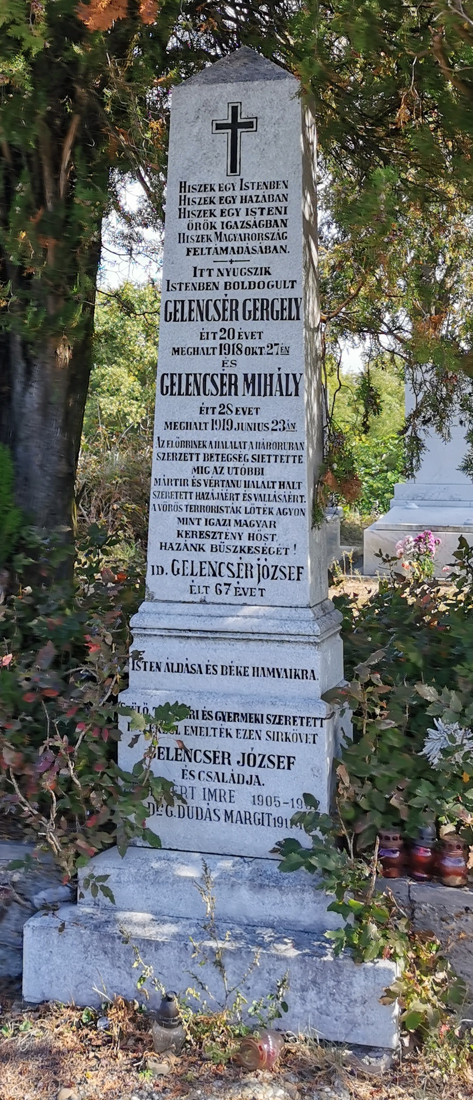 A Tanácsköztársaság egyik áldozatának síremléke (Soltszentimre, római katolikus temető)